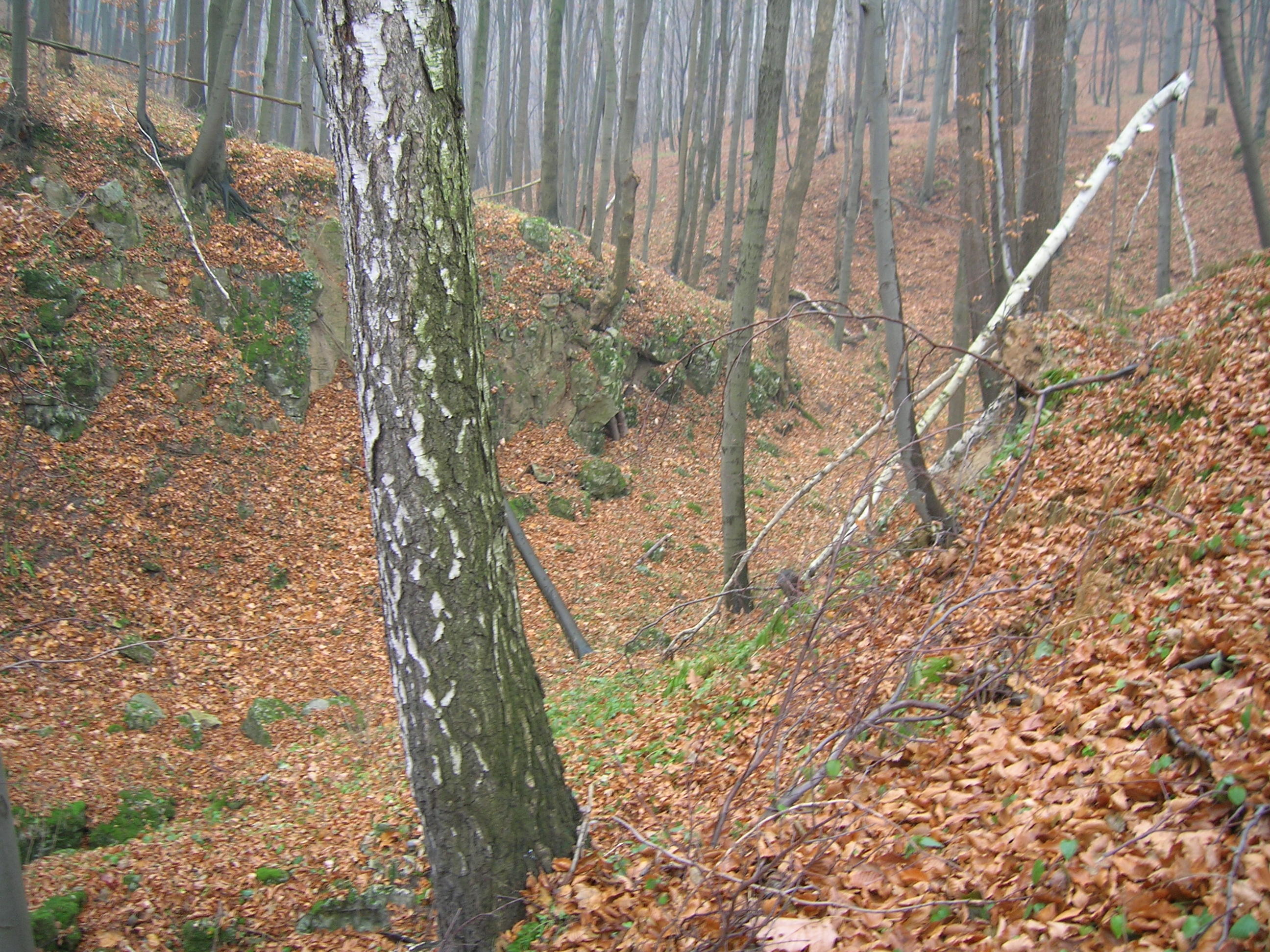 Wąwóz Kulenda. Część środkowa